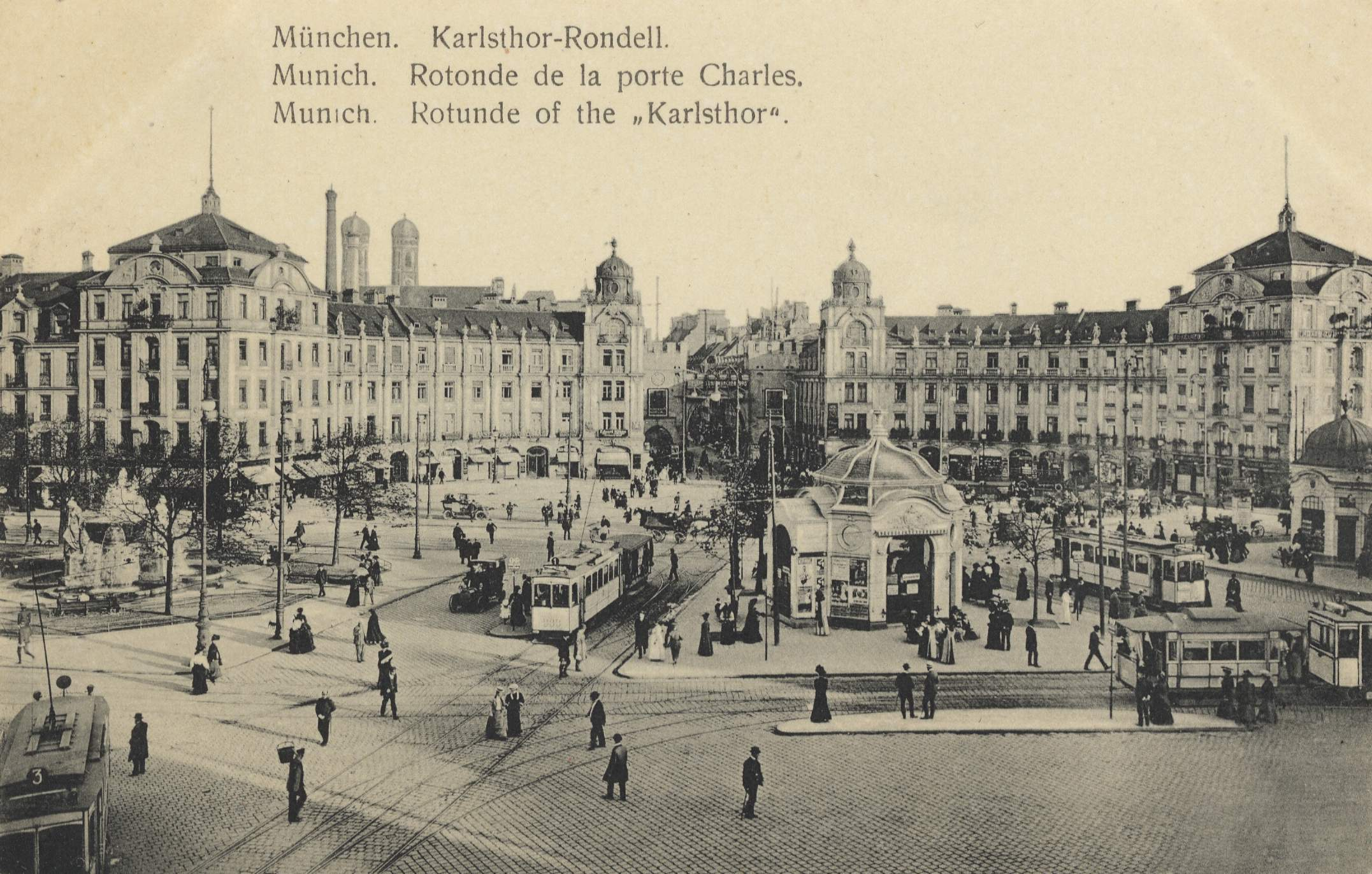 Karlstorrondell